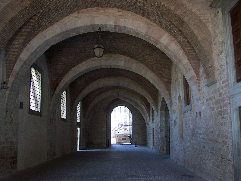 Gubbio - Passaggio sotto Palazzo Ducale